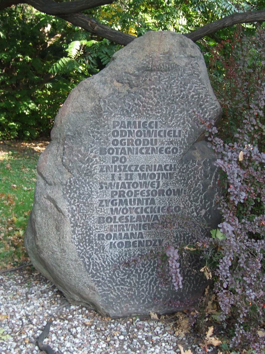 Obelisk, Ogród Botaniczny UW w Warszawie